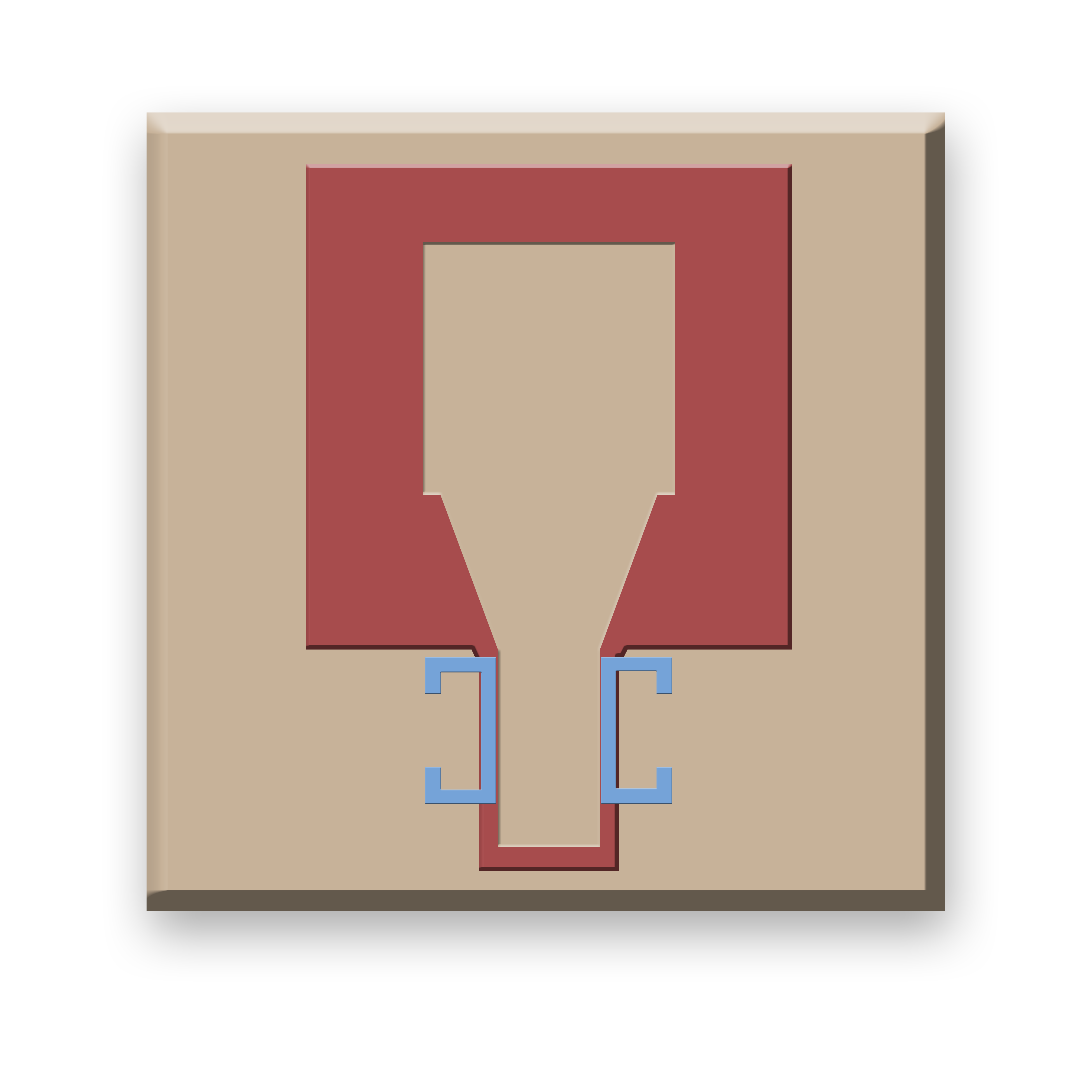 Représentation schématique d'un capteur de champs ultra-sensibles ou mixte